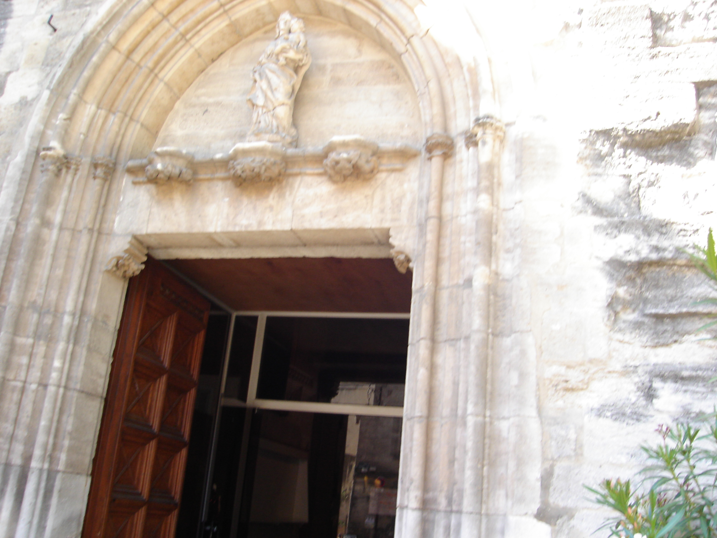 Porte entrée Collégiale Saint-Didier à Avignon